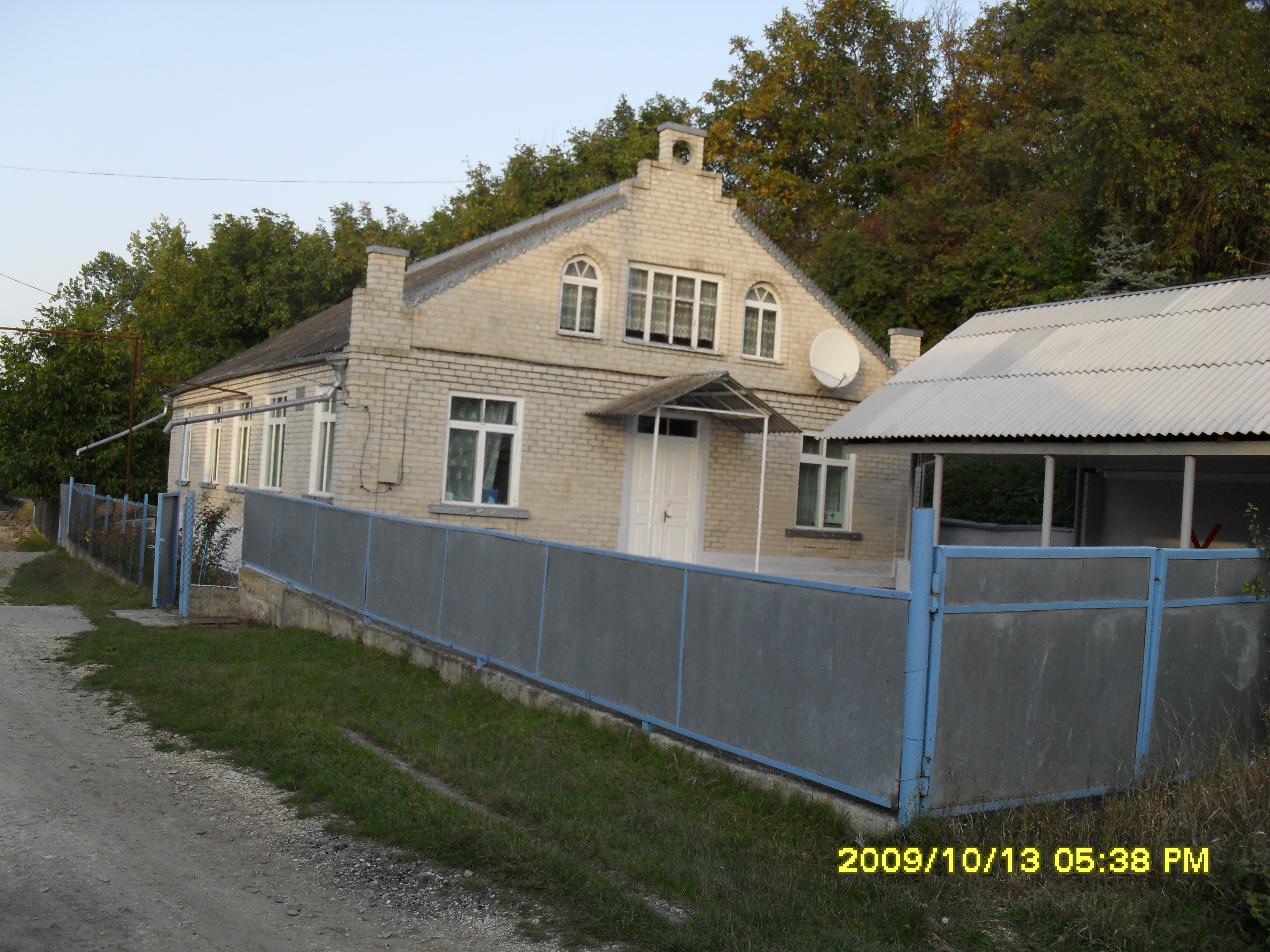 Молитвенный дом Адвентистов седьмого дня в селе Юца